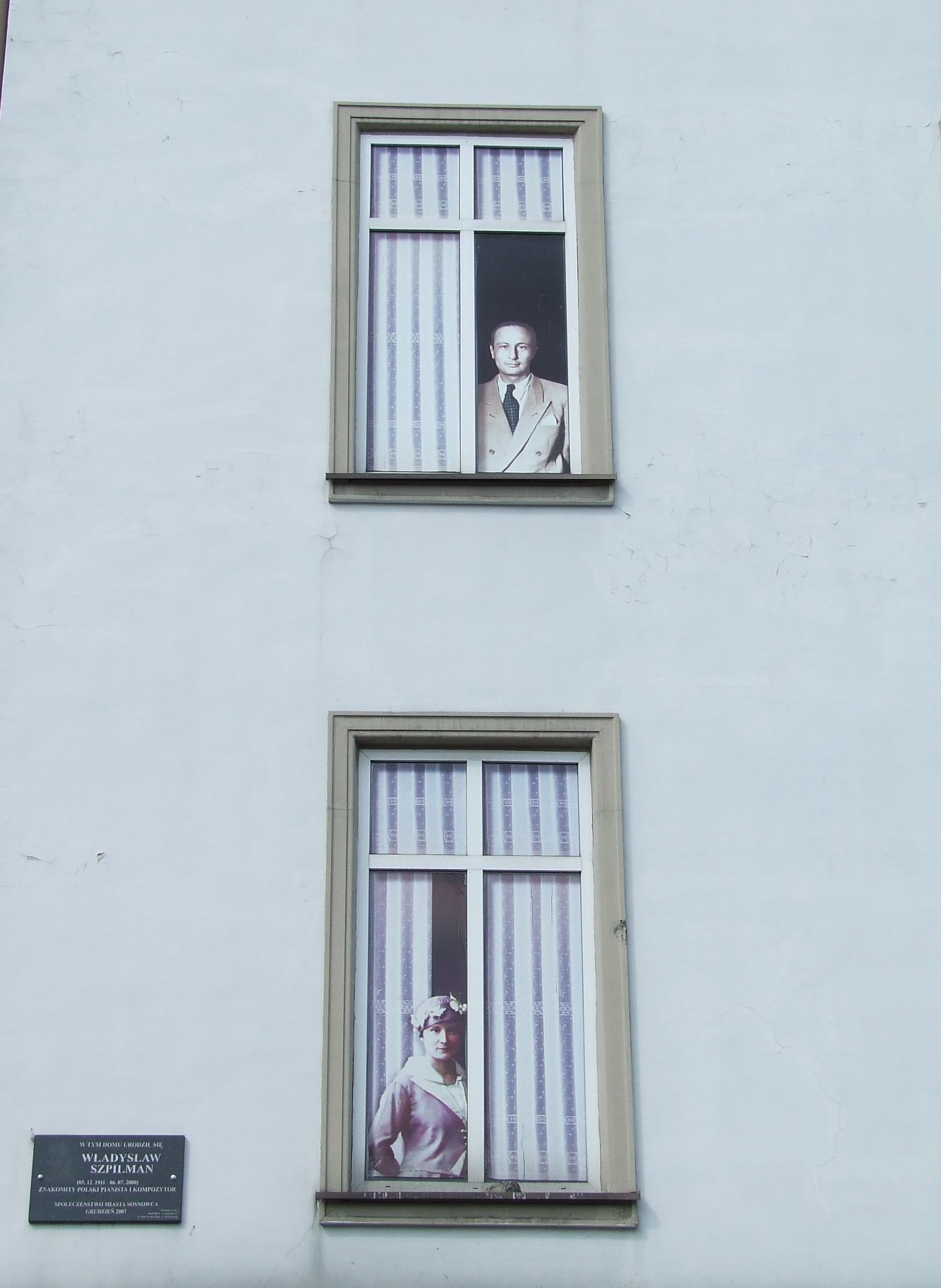 Tablica pamiątkowa na domu, w którym urodził się Władysław Szpilman w Sosnowcu